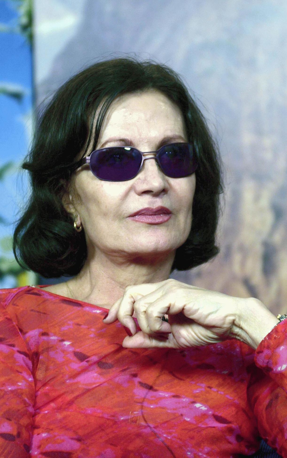 A atriz brasileira Rosamaria Murtinho.